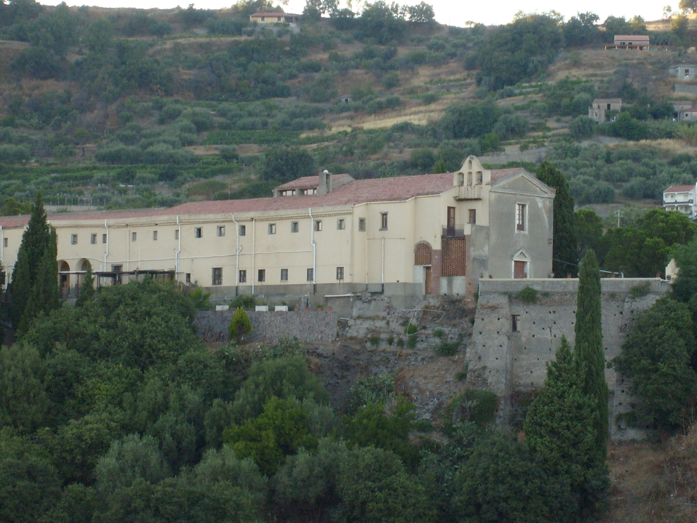 Convento dei Cappuccini di Savoca (1603)